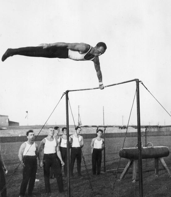 1935 Zlot jubileuszowy okręgu śląskiego Towarzystwa Gimnastycznego "Sokół" w Katowicach. Zawodnik Wilhelm Breguła podczas ćwiczeń na drążku gimnastycznym.